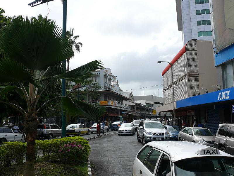 Renwick Road, Suva, Fiji